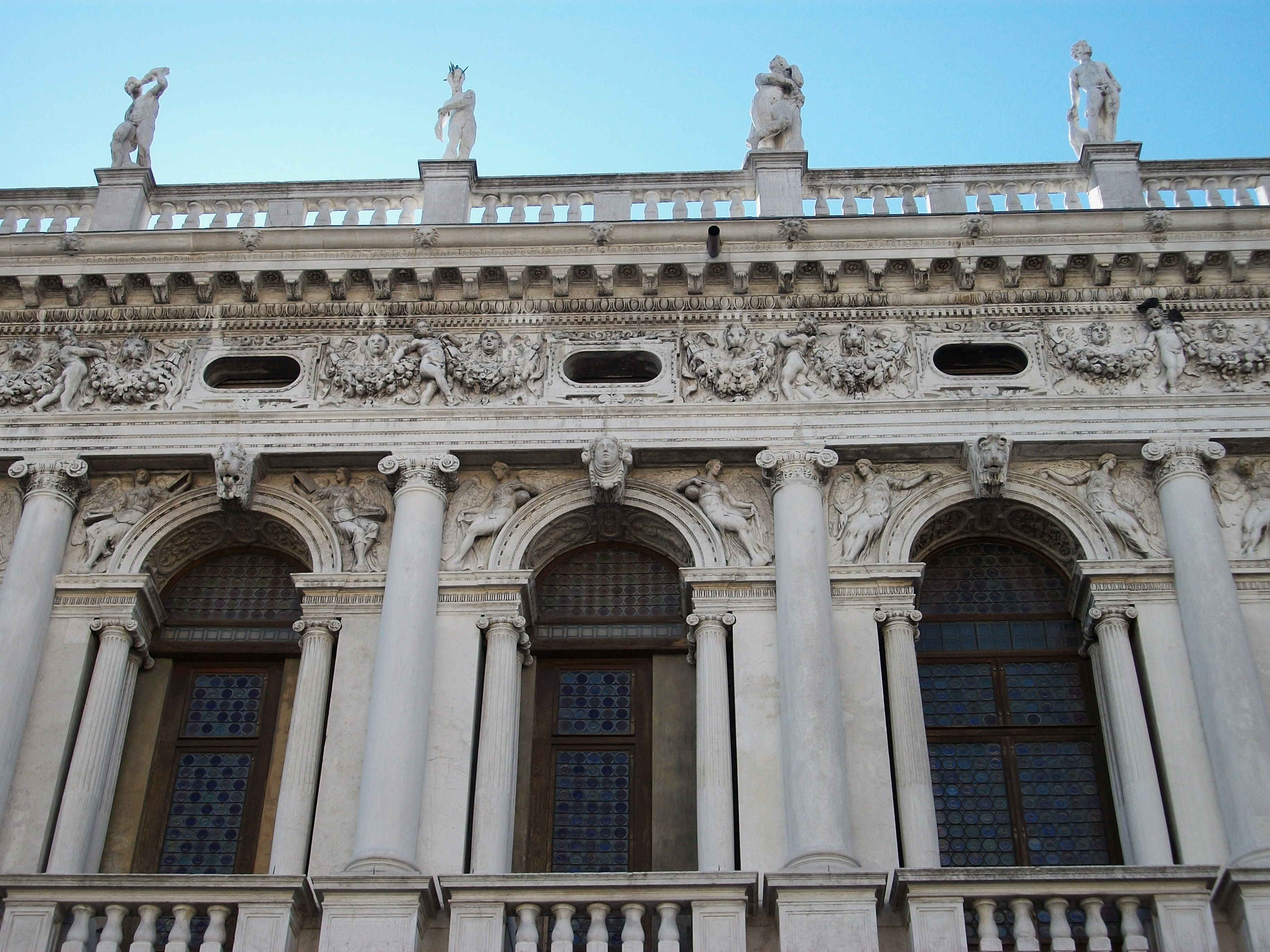 Detall del pis superior de la Biblioteca Marciana de Venècia.